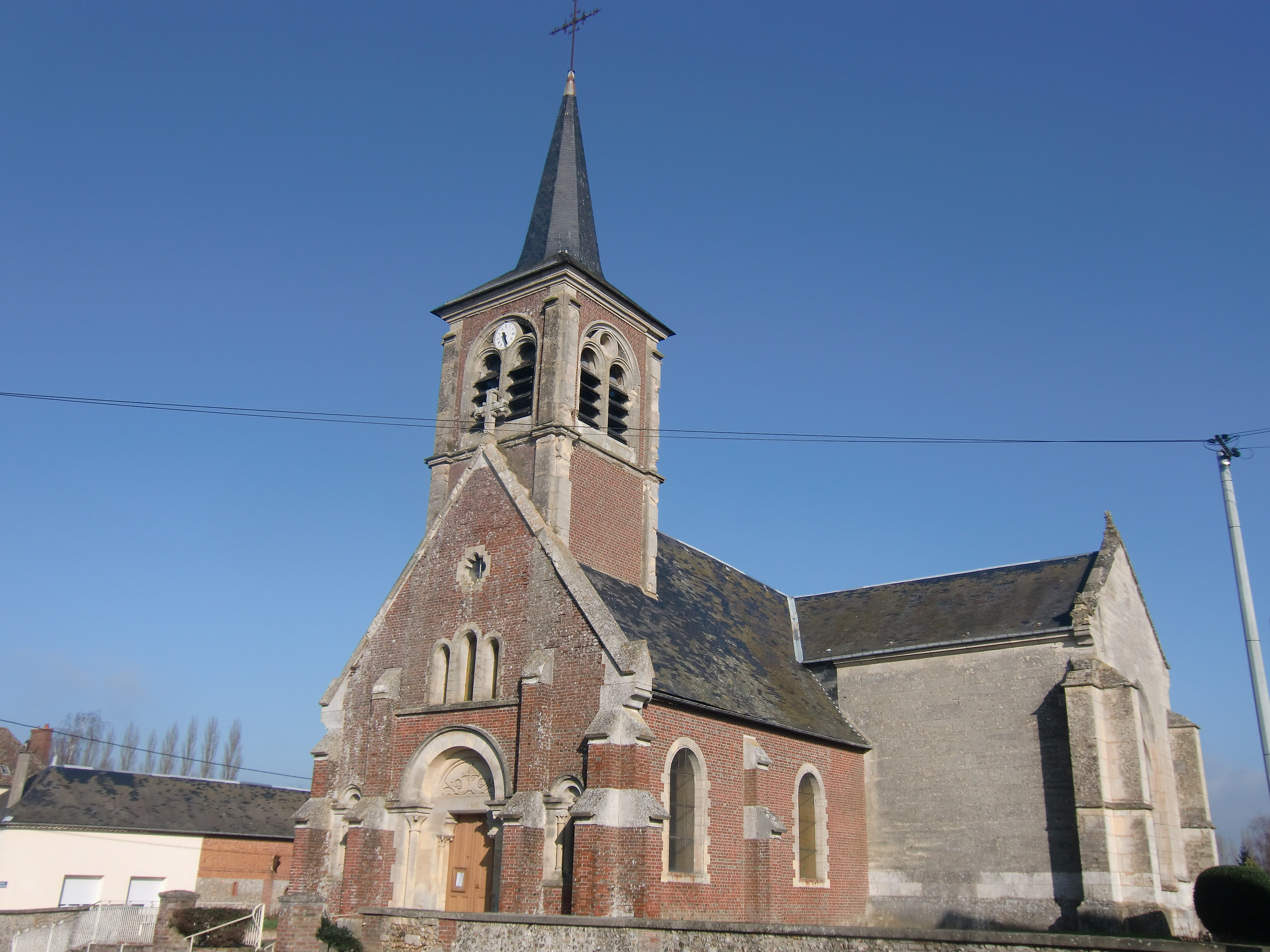 église paroissiale de Boisemont (Eure - Normandie - France)